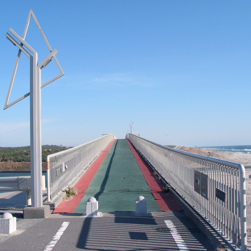 Shiosai Bridge 潮騒橋 静岡県掛川市国安で撮影